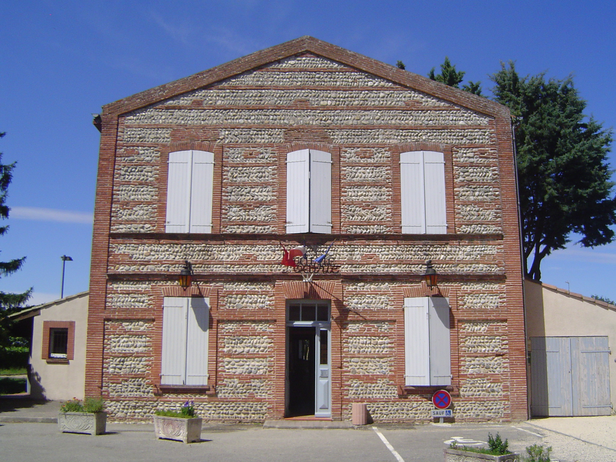 Vue de la mairie de Montbrun-Lauragais.